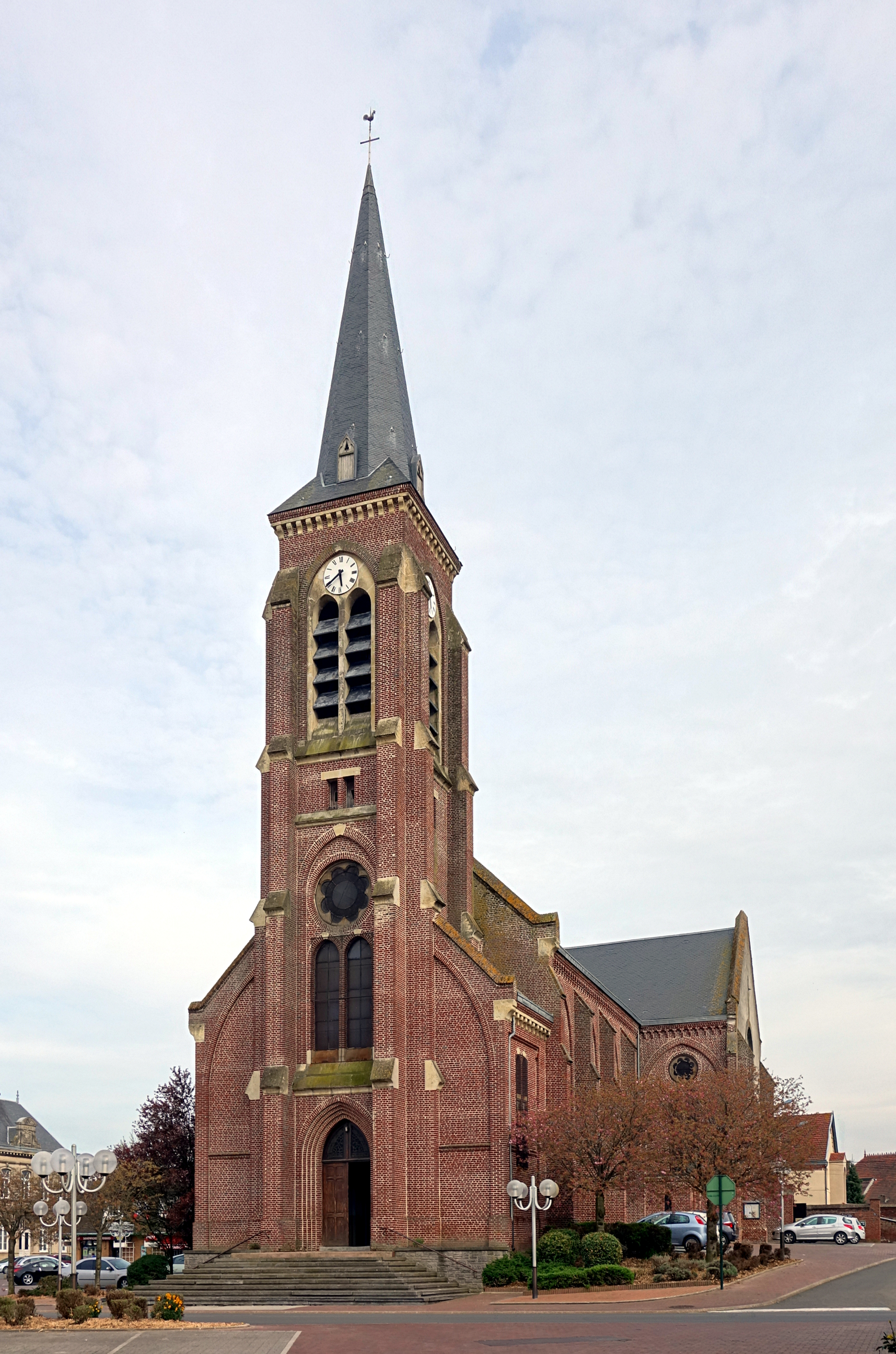 L'église saint Martin de Nœux-les-Mines.